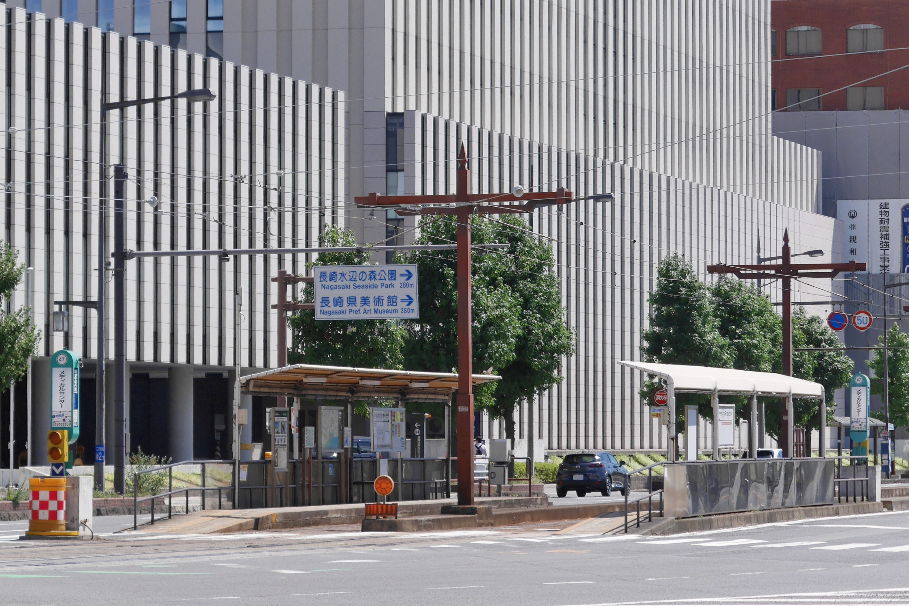 長崎電気軌道の「メディカルセンター」停留所（長崎県長崎市）。